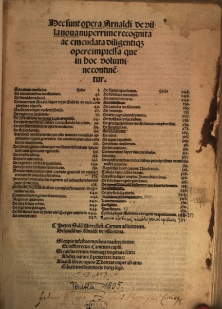 Arnaldus de Villa Nova, Opera (1505) title page